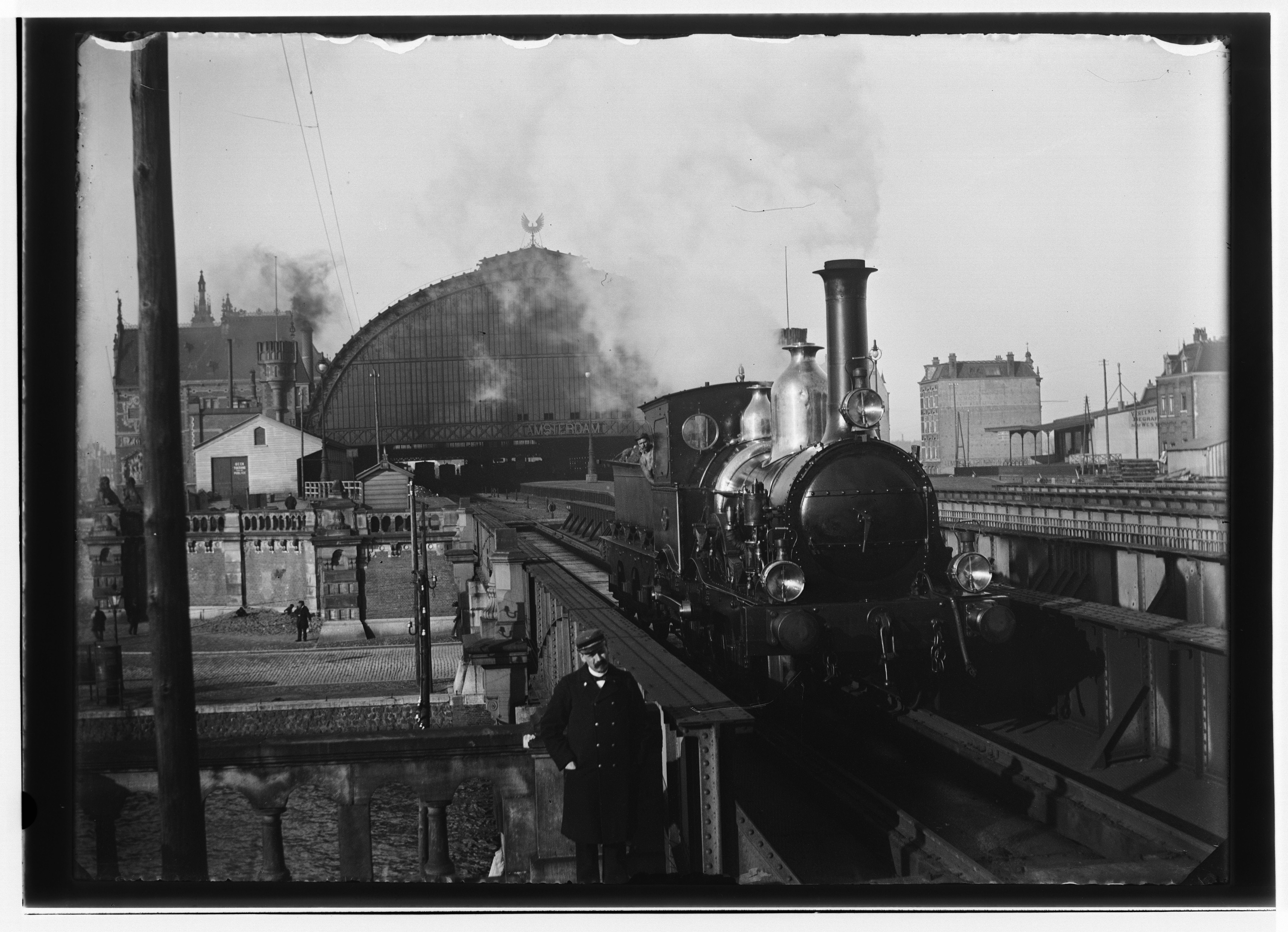 Beschrijving Centraal Station Spoorviaduct over Oostertoegang en Oostelijke Doorvaart. Documenttype foto Vervaardiger Olie``, Jacob (1834-1905) Collectie Collectie Jacob Olie Jbz. Datering 21 november 1895 Geografische naam Stationsplein Oostertoegang Inventarissen Afbeeldingsbestand 10019A000372 Generated with Dememorixer